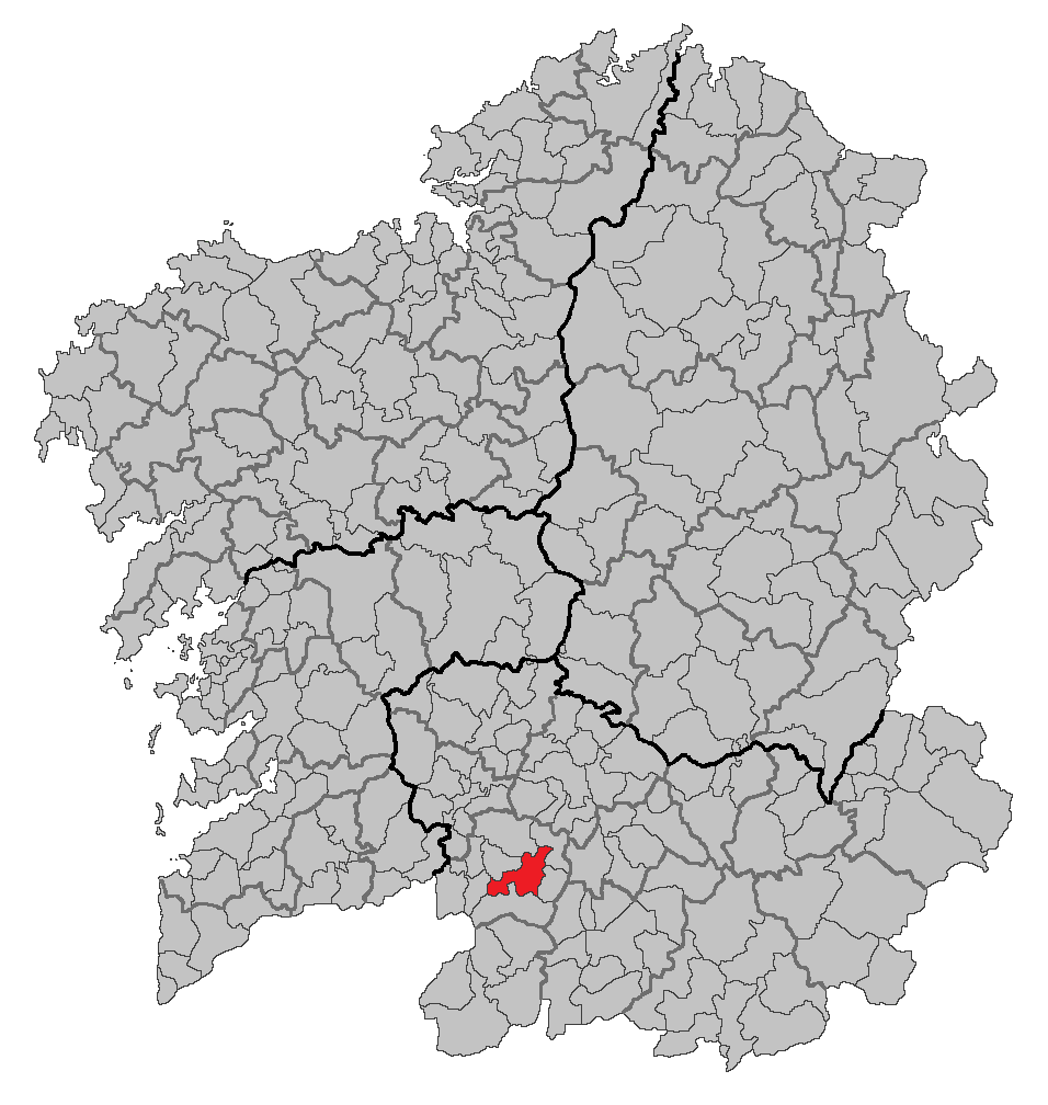 Mapa coa localización do concello de Celanova.